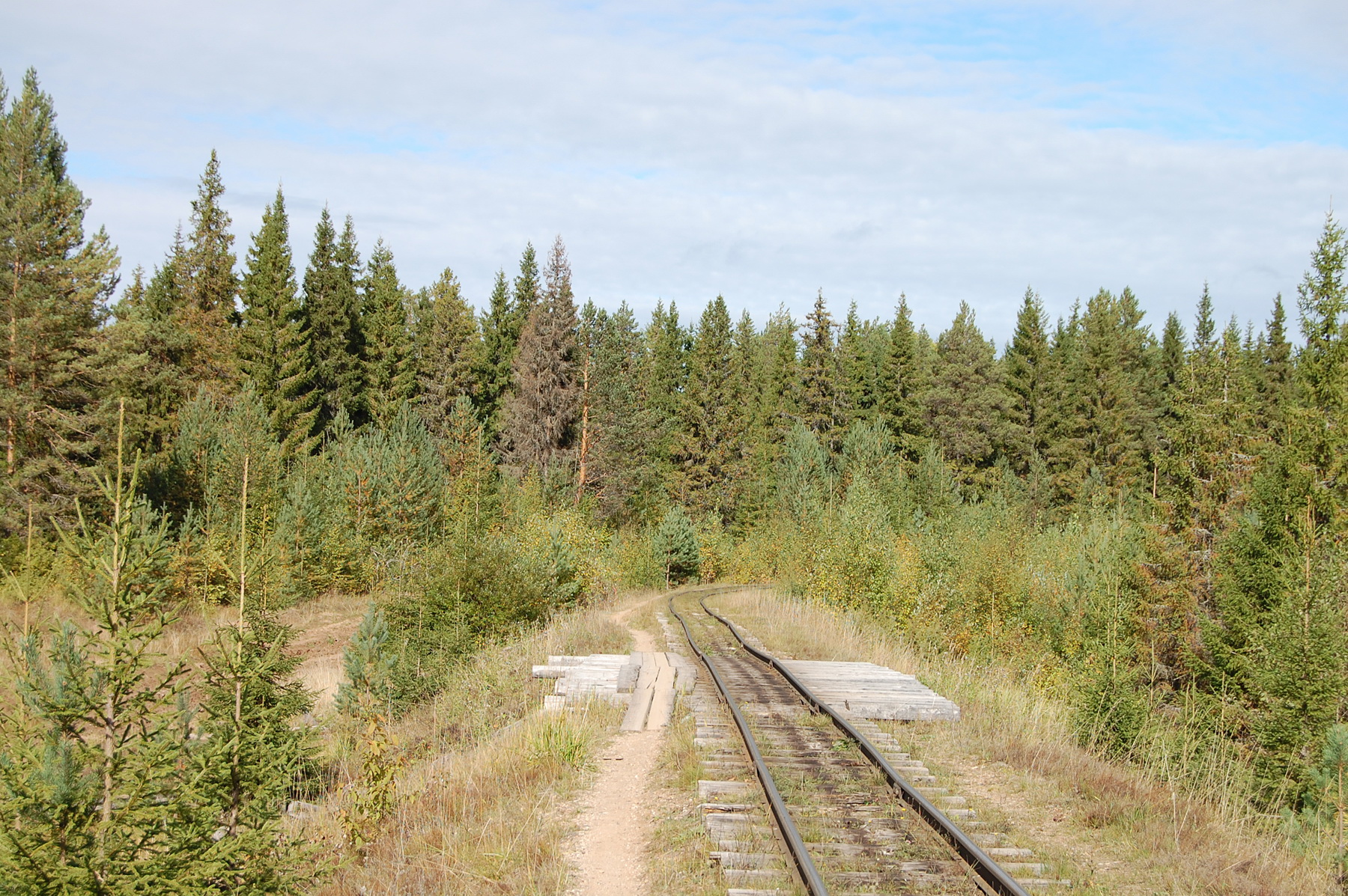 Перегон, Зеленниковская УЖД